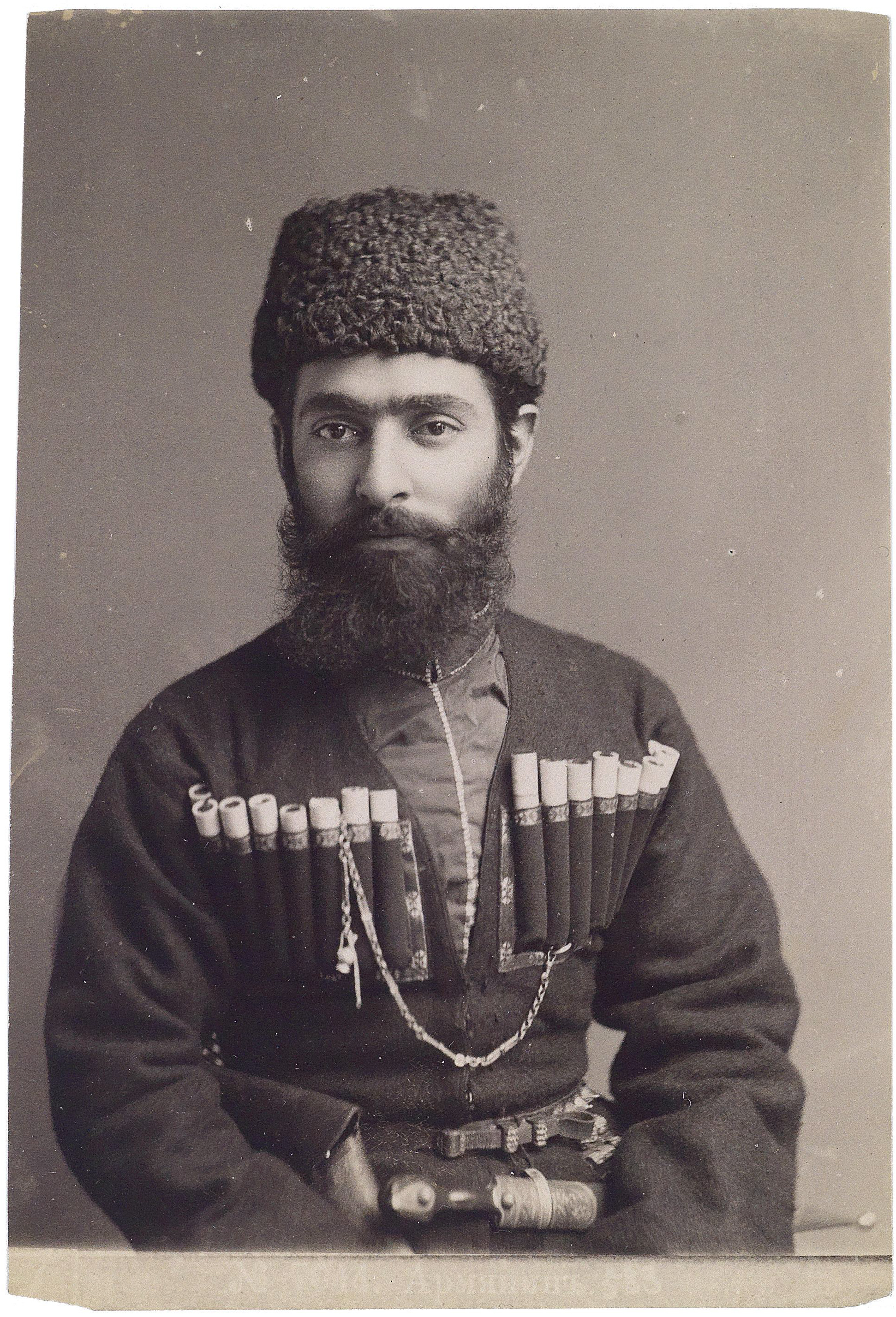 Armenier in kaukasischer Kleidung "Chokha" (Jacke) und "Papakhi" (Kappe), 1880er/90er Jahre, mit beibelichtetem Titel und Nummerierung: Nr. 7044 Armjan 583, auf der Rückseite mit Bleistift bezeichnet, 14,1 x 9,7 cm